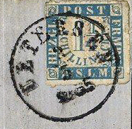 Poststempel des ehemaligen Postamtes in Uetersen aus dem Jahr 1865